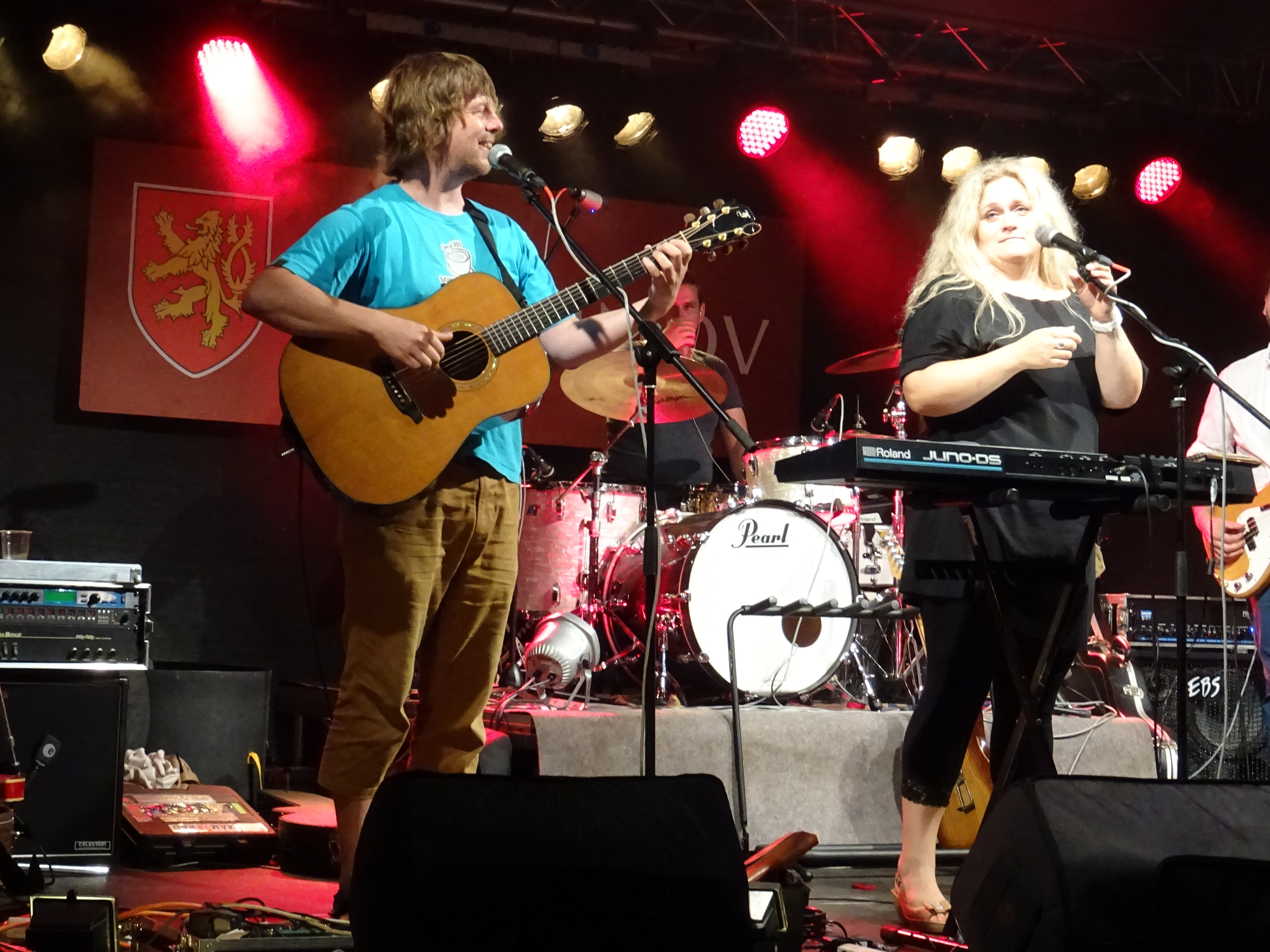 Skupina Jarret na koncertě v Rousínově v srpnu 2019